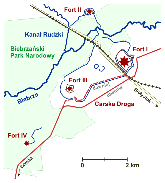 Carska Droga (Carski Trakt, Carska Szosa( obok Twierdzy Osowiec. Przerywaną czerwoną linią zaznaczony przebieg pierwotny, ciągłą obecny. Przebieg historyczny identyczny np. z mapą Wojskowego Instytutu Geograficznego (WIG) 1:25000 REJON OSOWIEC (XVIII-12-C) ARKUSZ 5 OSOWIEC, godło arkusza P35 S35 B (3535 B), rok wydania 1927